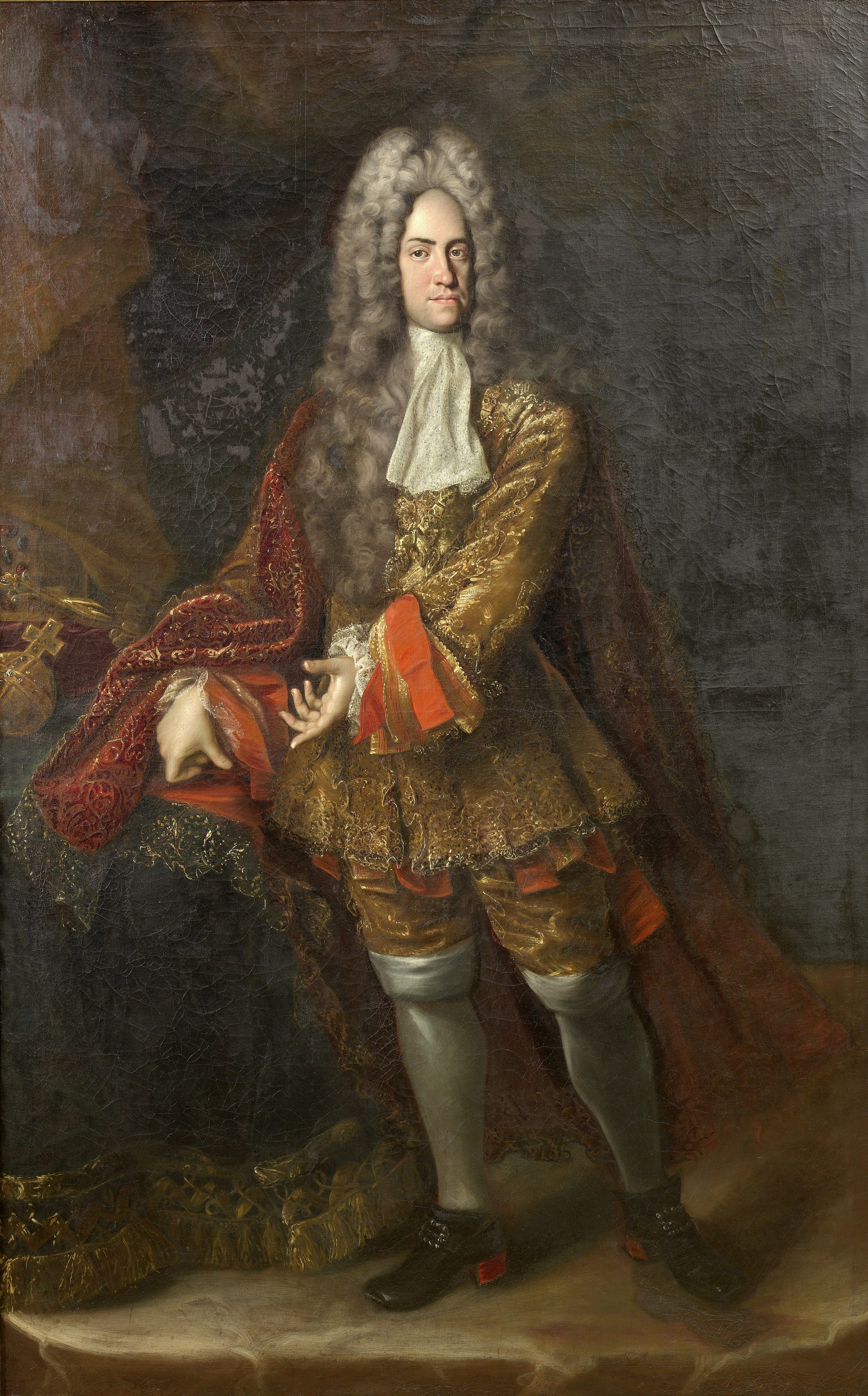 Charles VI du Saint-Empire